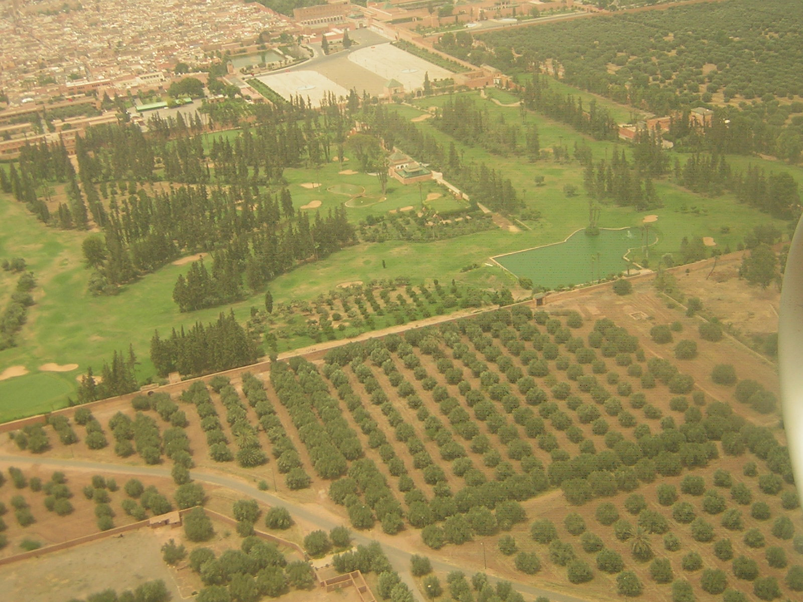 Agdal Gardens